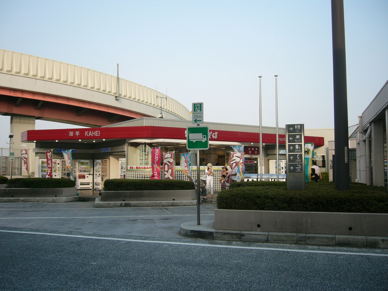 Kahei Parking Area